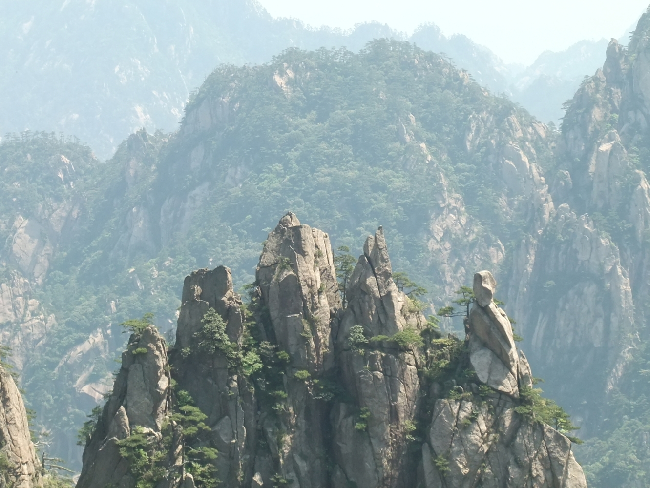 笔架峰 - Pen Rack Peak - 2010.05